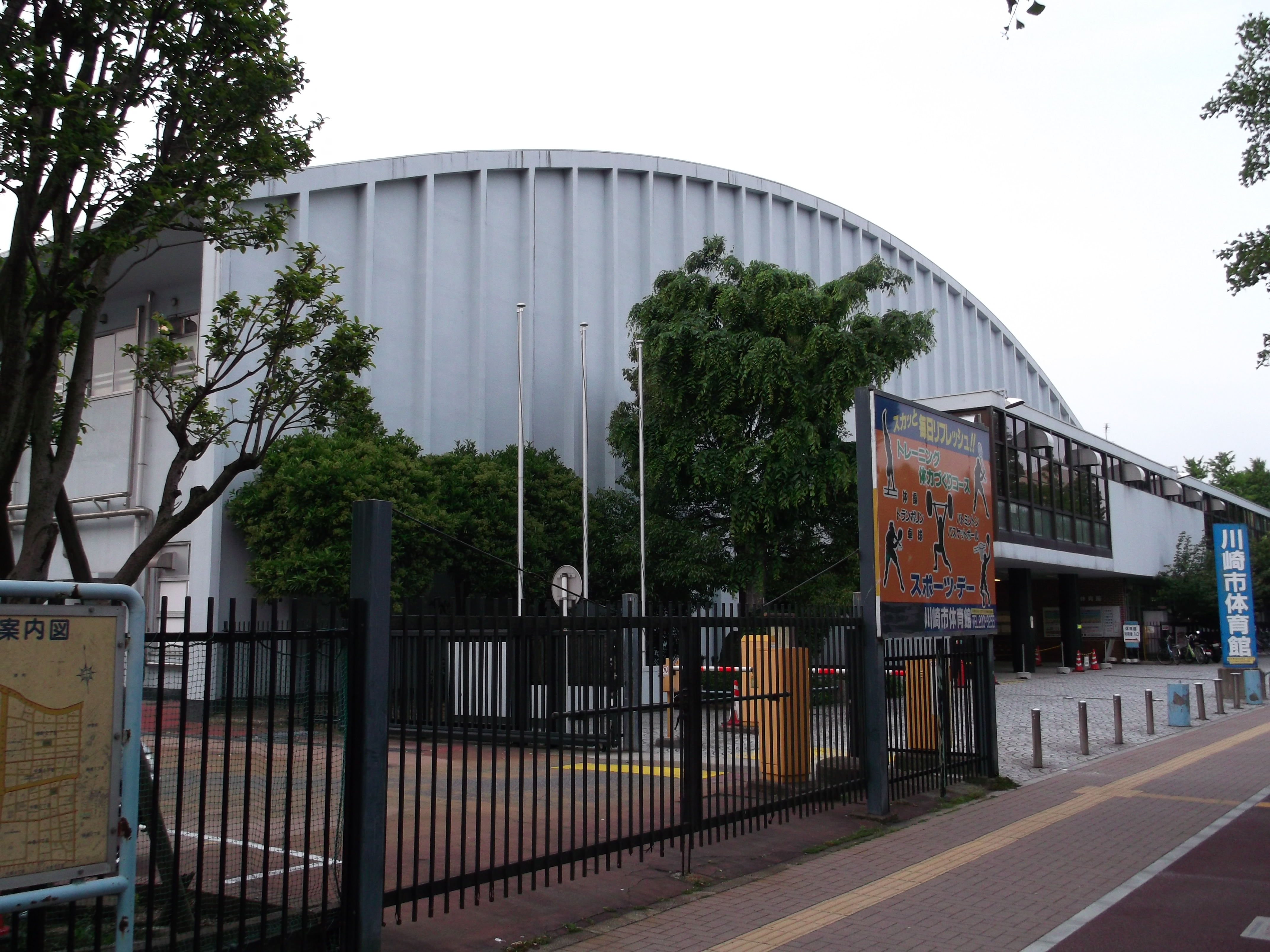 川崎市体育館